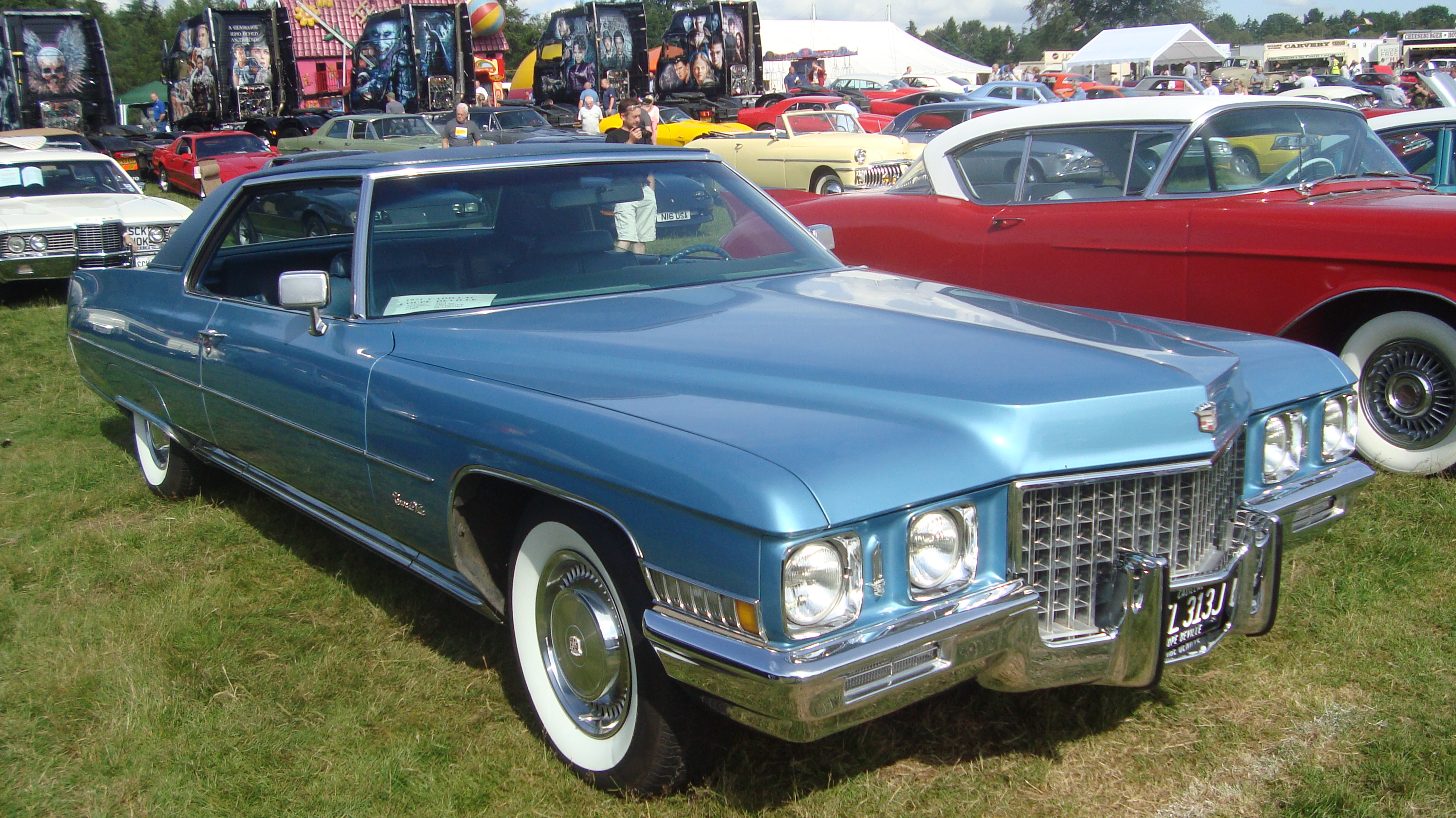 Cadillac Coupe De Ville